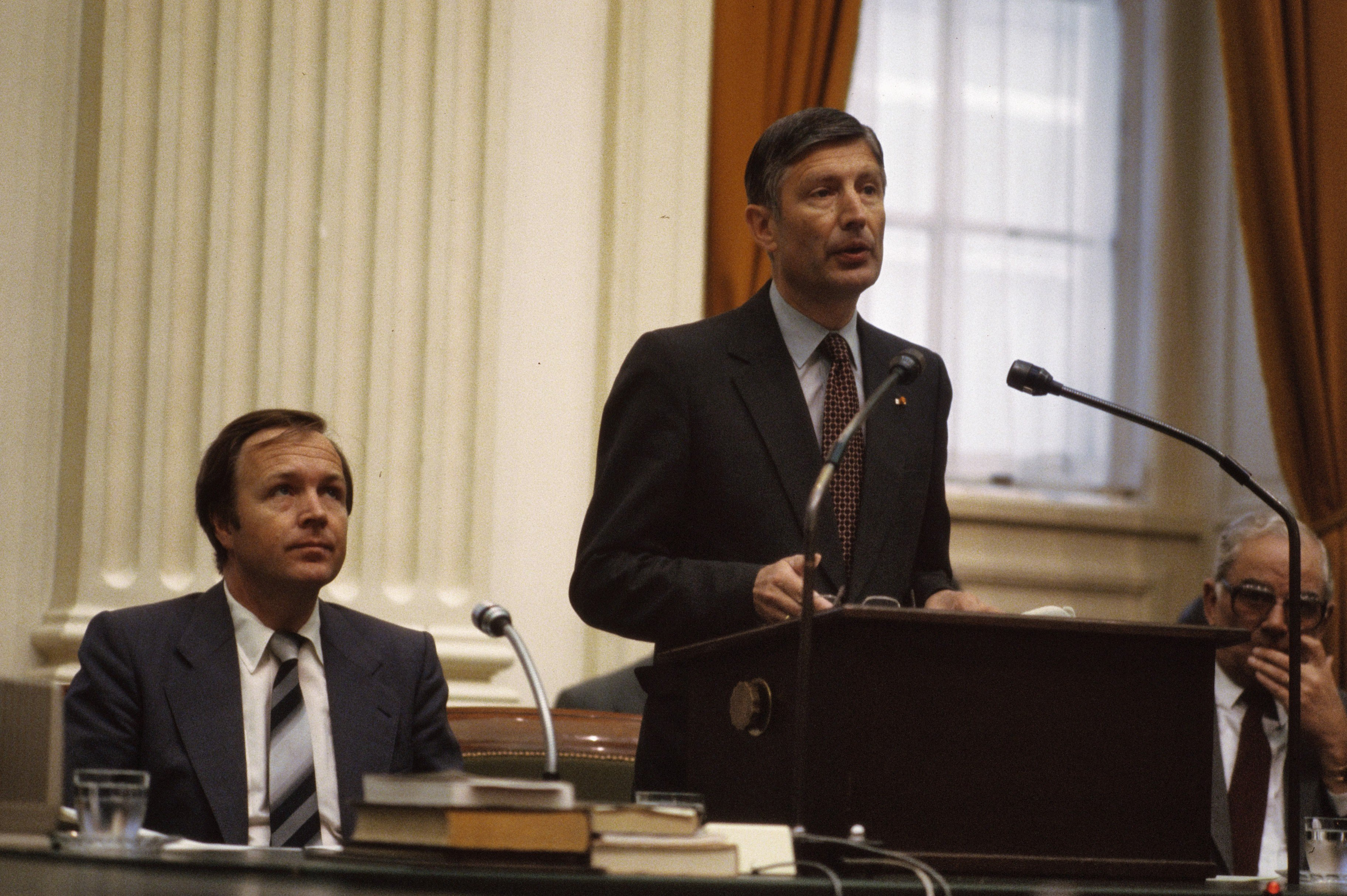 Collectie / Archief : Fotocollectie Anefo Reportage / Serie : [ onbekend ] Beschrijving : Regeringsverklaring kabinet van Agt III ; premier van Agt leest regeringsverklaring (links) Terlouw Datum : 8 juni 1982 Trefwoorden : kabinetten, politiek, premiers Fotograaf : Bogaerts, Rob / Anefo Auteursrechthebbende : Nationaal Archief Materiaalsoort : Dia (kleur) Nummer archiefinventaris : bekijk toegang 2.24.01.06 Bestanddeelnummer : 253-8743